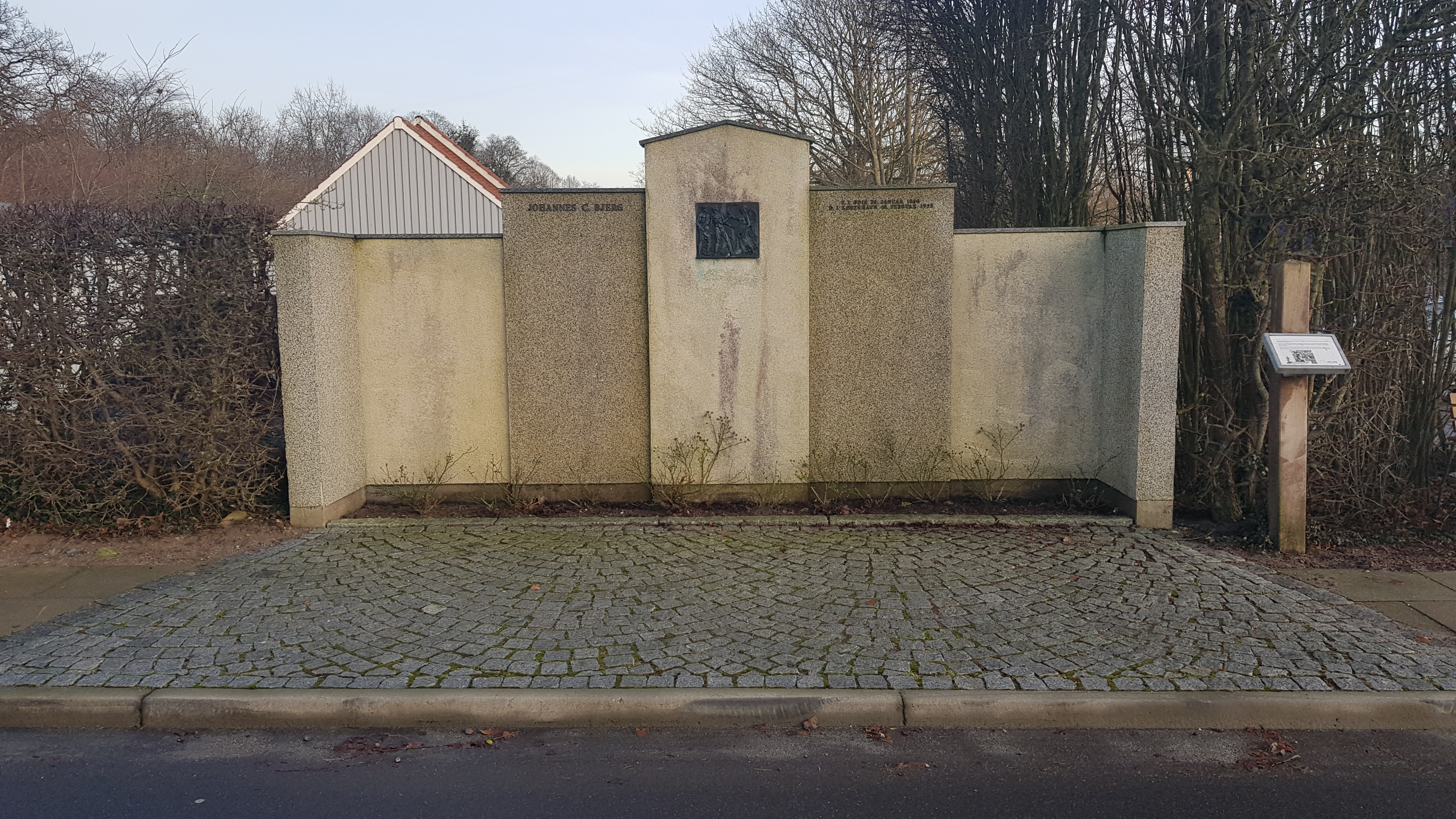 Mindemur rejst i Ødis i 1961 i anledning af billledhuggeren og bysbarnet Johannes Clausen Bjergs 75 års fødselsdag